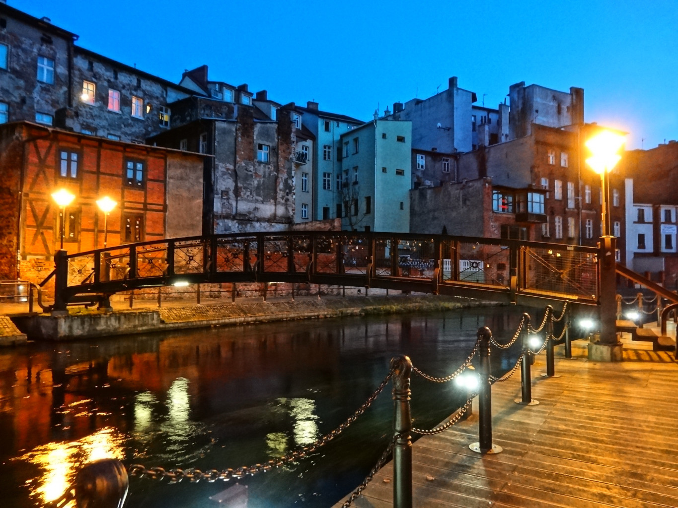 Kładka dla pieszych nad Młynówką w rejonie Wenecji Bydgoskiej, prowadząca z Wyspy Młyńskiej do ulicy Długiej w Bydgoszczy